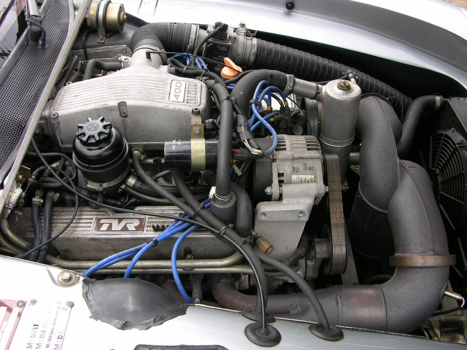 1997 TVR Chimaera 4.0